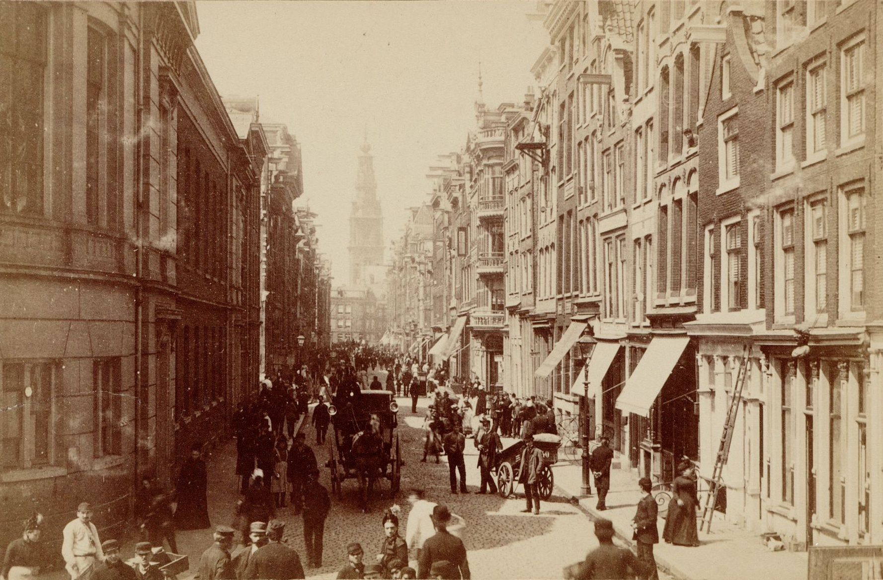 Cropped version of File:Jodenbreestraat1894.jpg